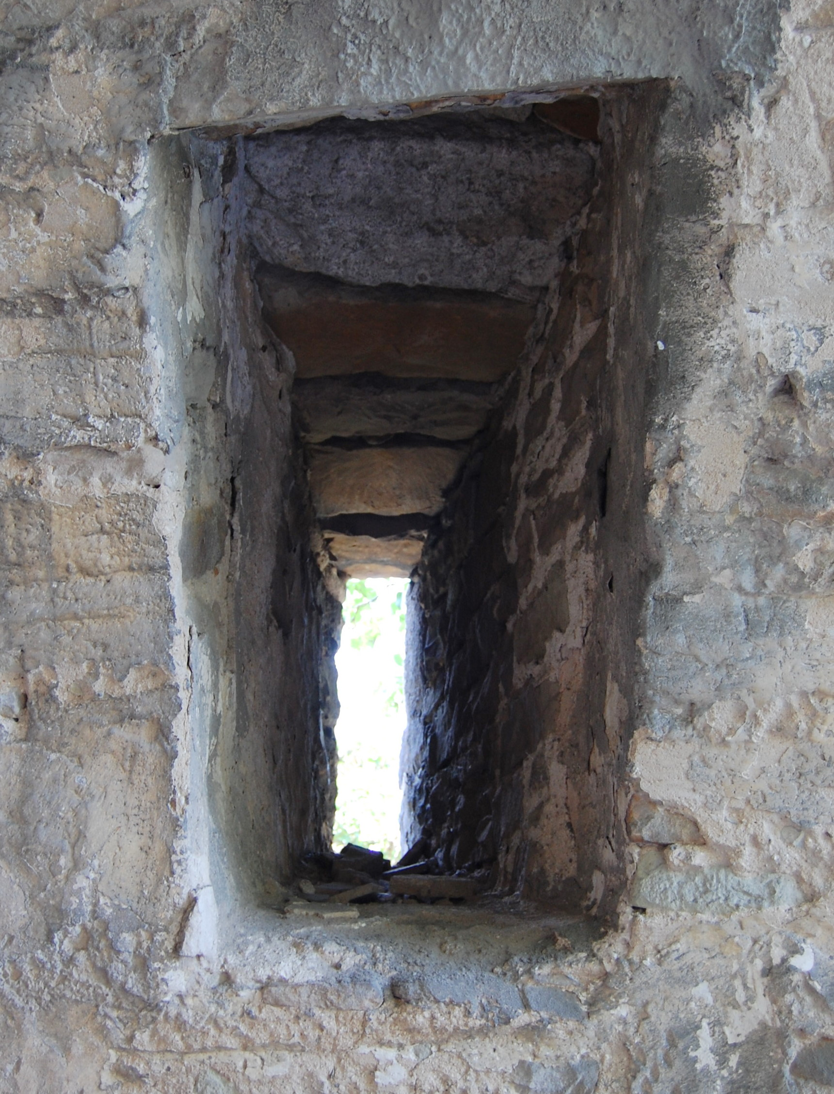 Nordfenster des Turmuntergeschosses der Sankt-Stephanus-Kirche in Magdeburg-Westerhüsen